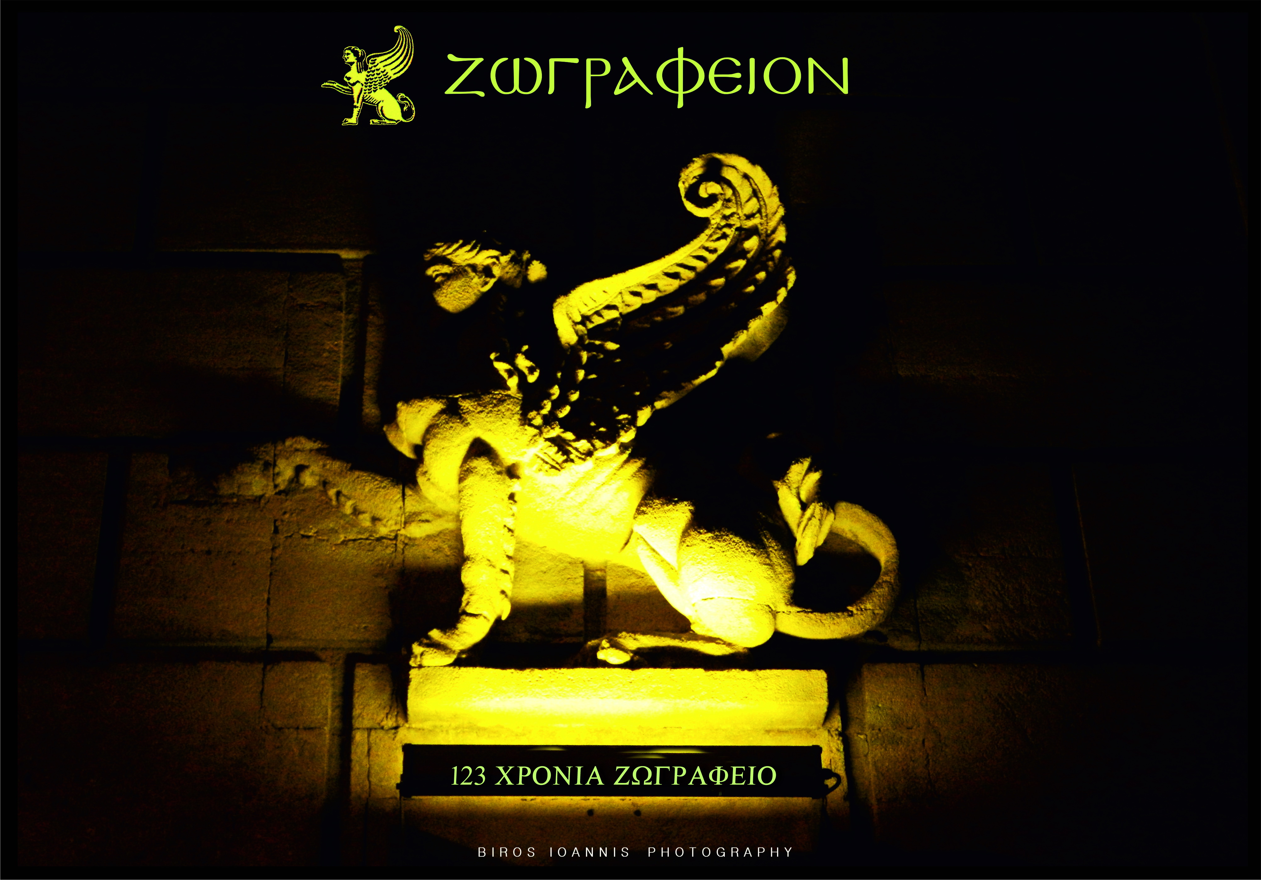 Η Σφίγγα στην πρόσοψη του Ζωγραφείου Λυκείου.